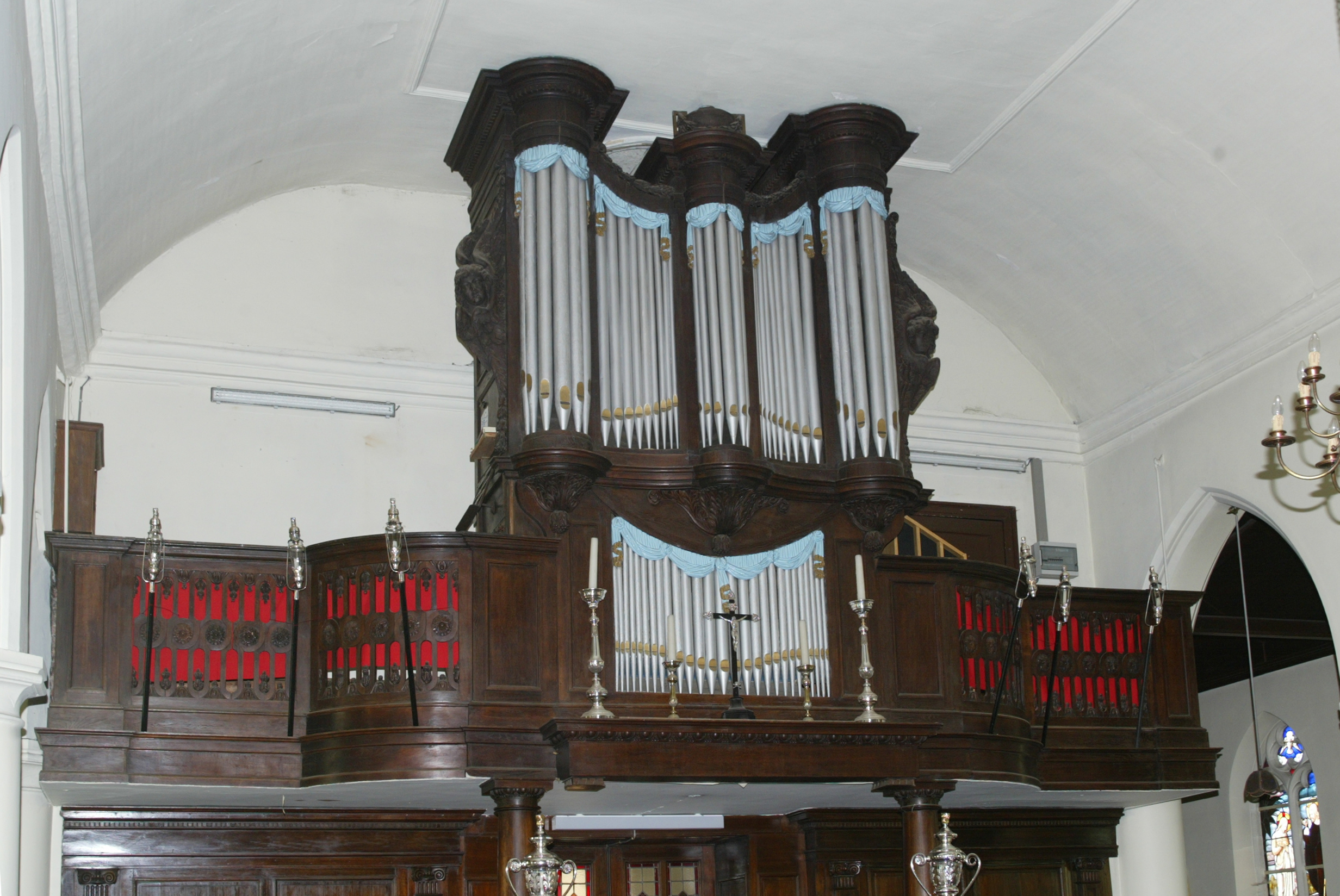 Het orgel in de kerk van Gelrode